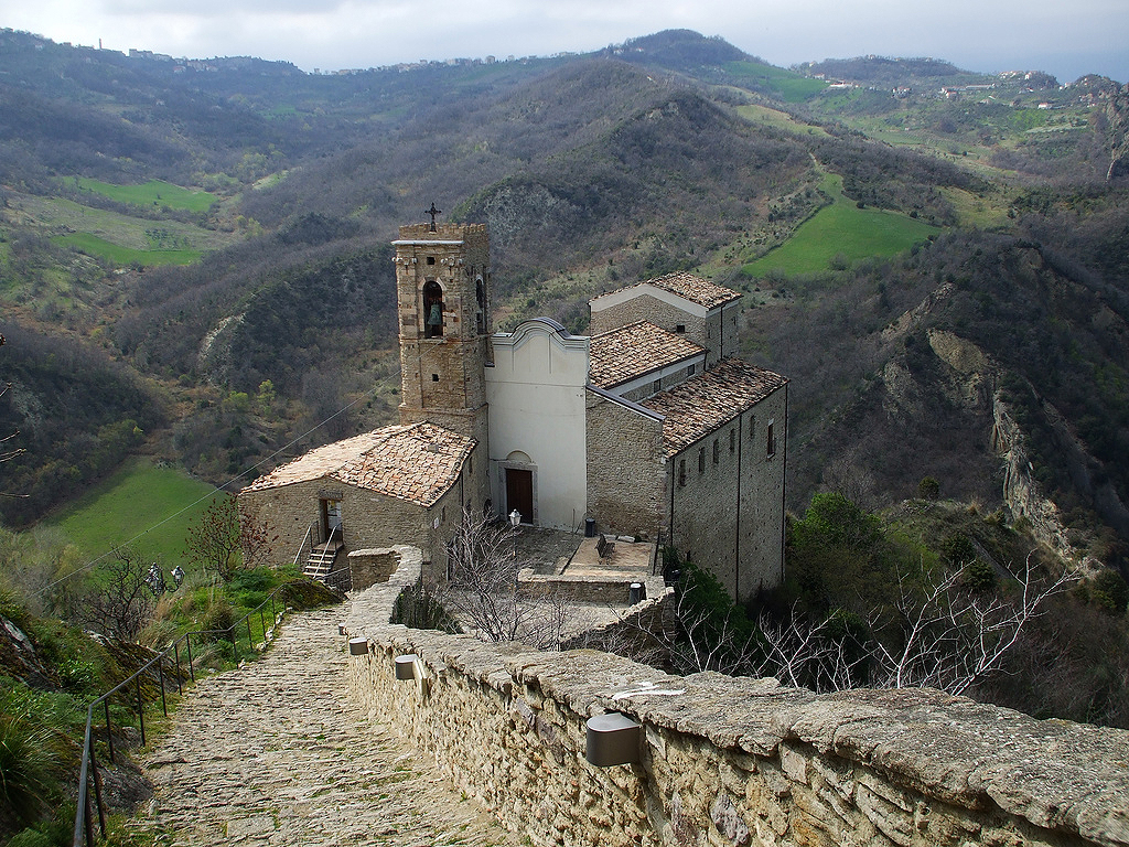 Roccascalegna - Chiesa di San Pietro/Église Saint-Pierre